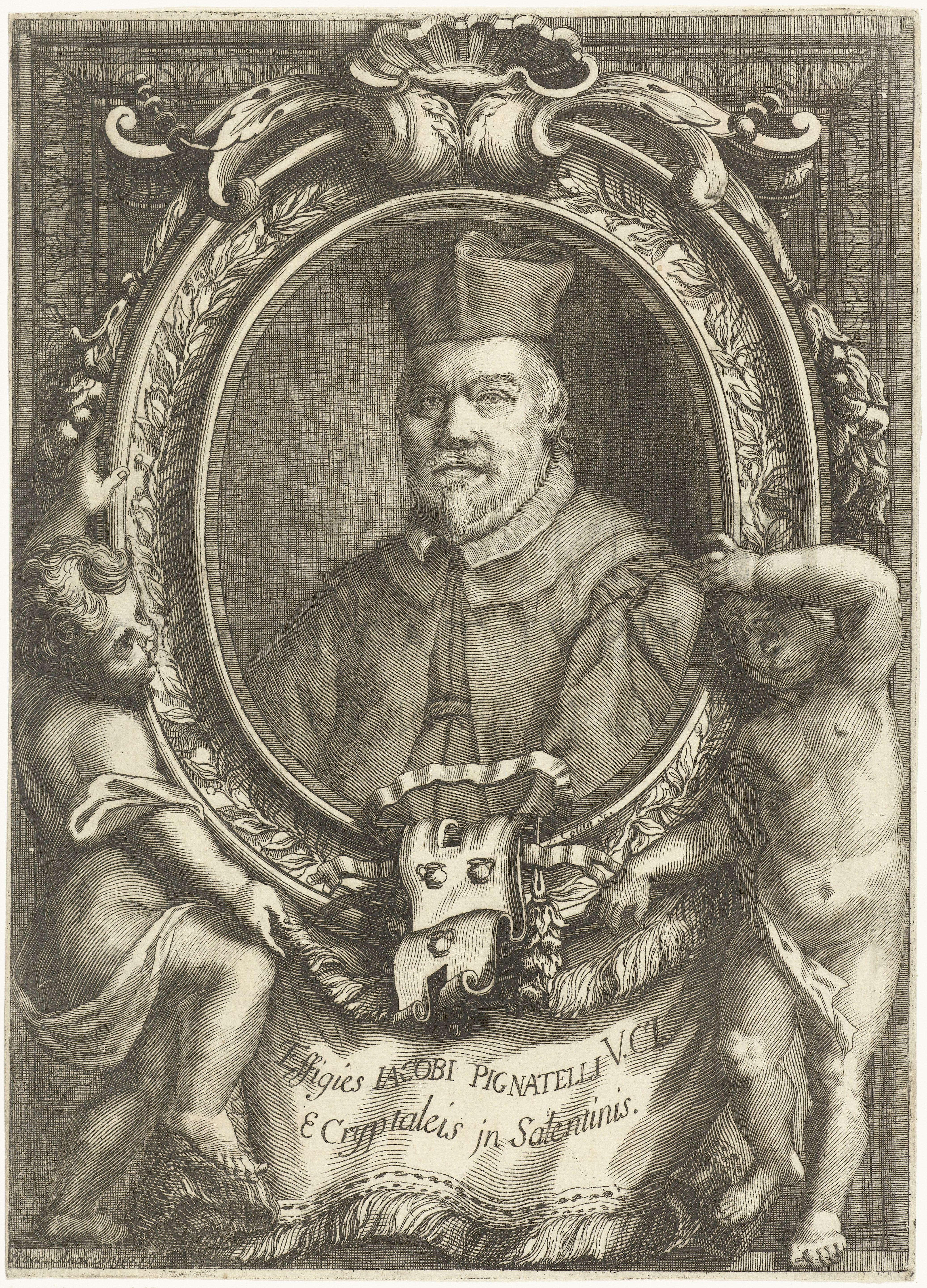 IdentificatieTitel(s): Portret van Jacob PignatelliObjecttype: prent boekillustratie Objectnummer: RP-P-1909-4683Opschriften / Merken: verzamelaarsmerk, verso, gestempeld: Lugt 2228Omschrijving: Portret van de jurist Jacob Pignatelli in ovaal in een ornamentele lijst die wordt gehouden door twee putti. Onder aan de lijst een banderol met Pignatelli's familiewapen. Bladzijde uit een boek met tekst op het verso.VervaardigingVervaardiger: prentmaker: Johannes Collin (vermeld op object)naar tekening van: Francesco Andreoni (vermeld op object)Datering: ca. 1675 - ca. 1700Fysieke kenmerken: gravure en etsMateriaal: papier Techniek: graveren (drukprocedé) / etsenAfmetingen: blad: h 290 mm × b 208 mmToelichtingAuteursportret voor: Giacomo Pignatelli, Novissimae consultationes canonicae, (verschillende edities).OnderwerpWie: Jacob PignatelliVerwerving en rechtenVerwerving: aankoop 1905Copyright: Publiek domein